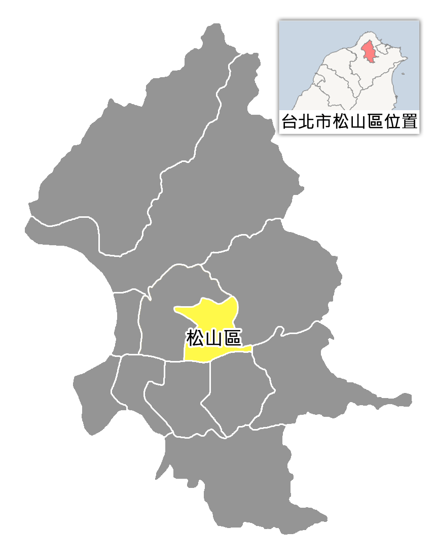 臺北市松山區位置。